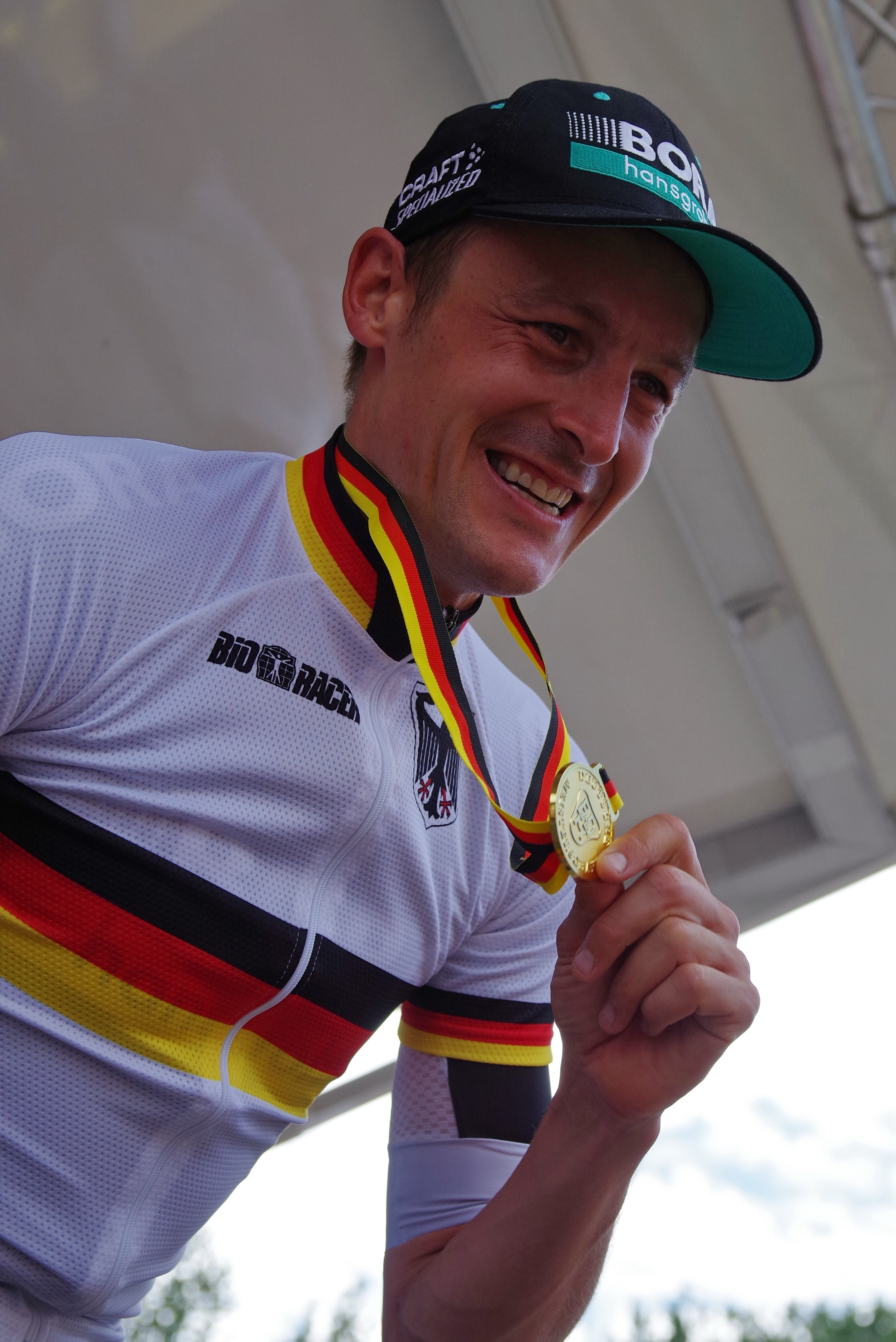 Deutsche Meisterschaften im Straßenrennen 2017 (Männer) 25. Juni 2017 Siegerehrung Platz 1: Marcus Burghardt Platz 2: Emanuel Buchmann Platz 3: John Degenkolb The making of this document was supported by the Community-Budget of Wikimedia Germany.